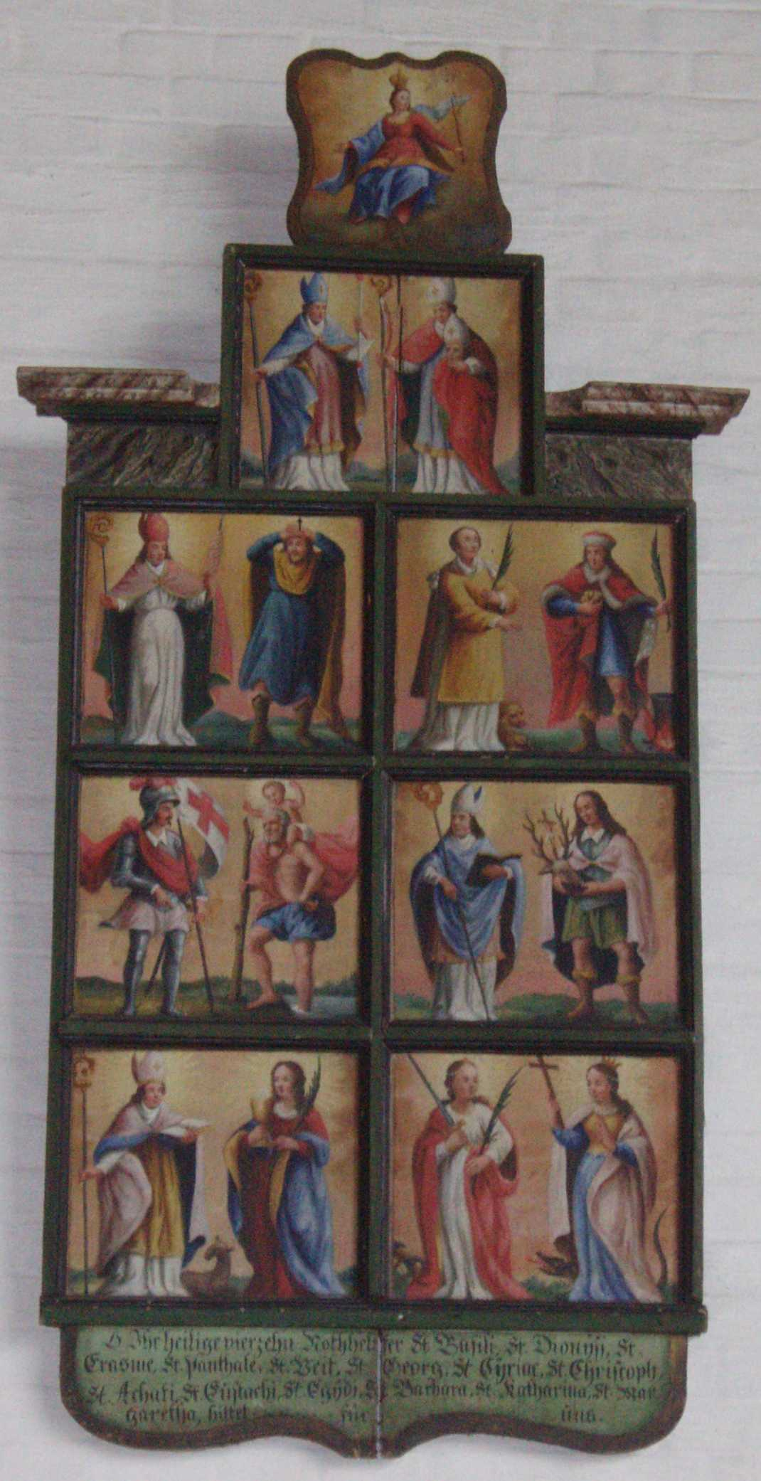 Barockbild der Vierzehn Nothelfer in der Kath. Pfarrkirche von Eitensheim